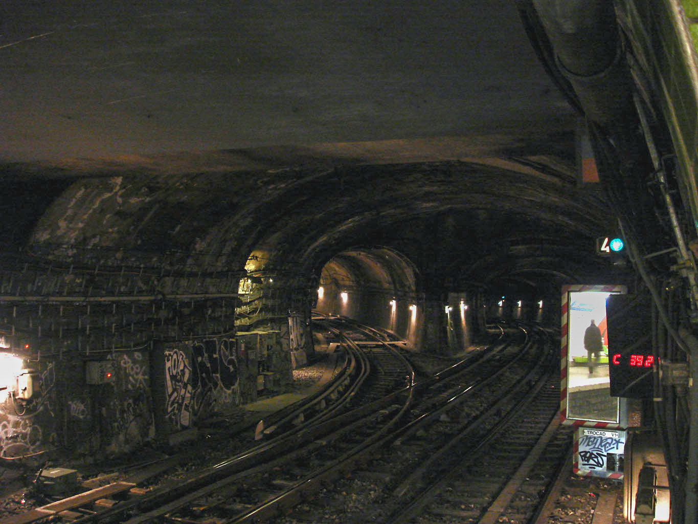 Station Trocadéro (ligne 9), raccordement de la ligne 9 vers la ligne 6 du métro de Paris, France.